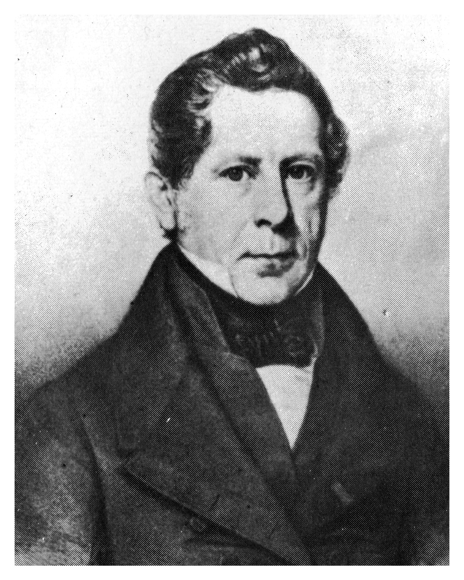 Porträt Ernst Reinecke (* 4. August 1790 in Barsinghausen; † 25. September 1857 in Hannover)